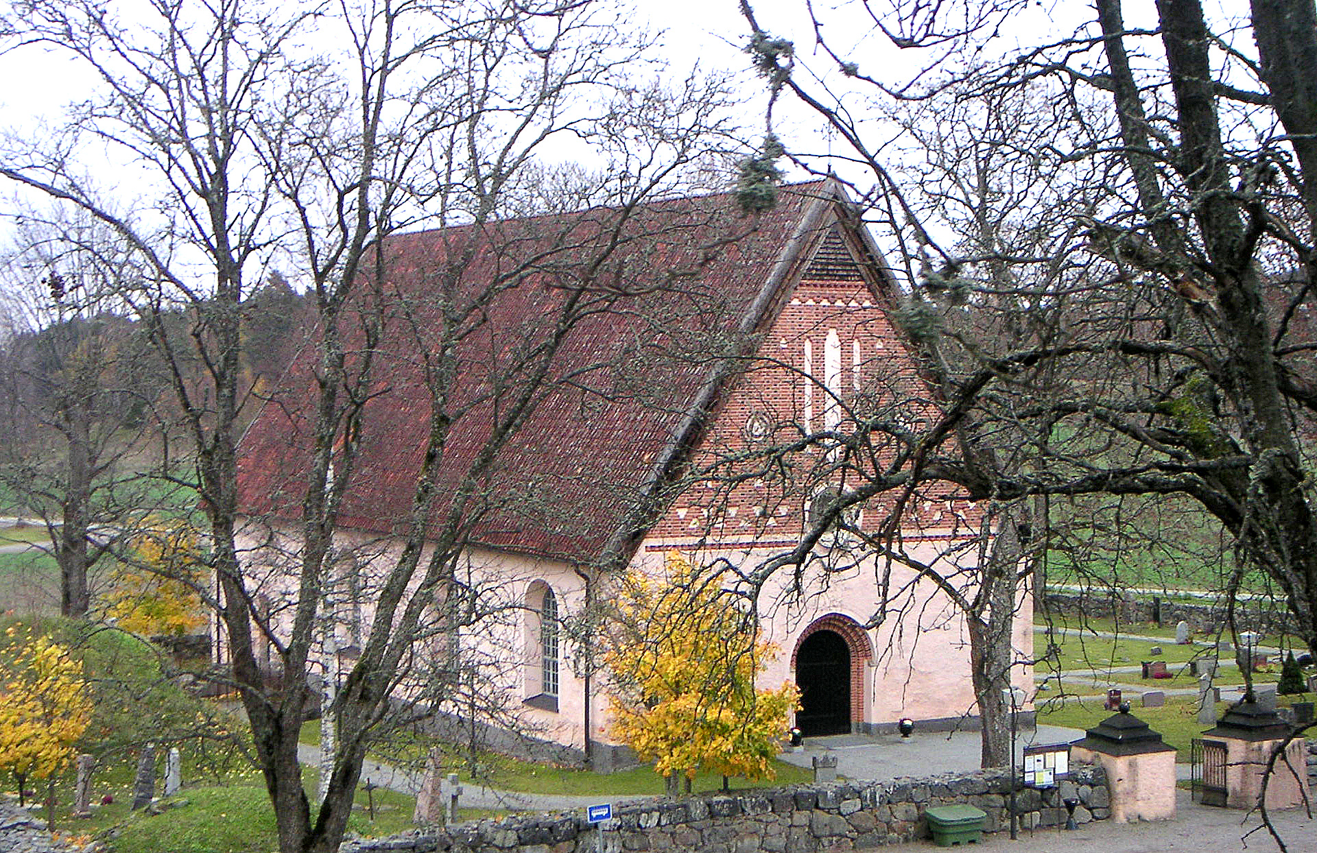 Giresta kyrka